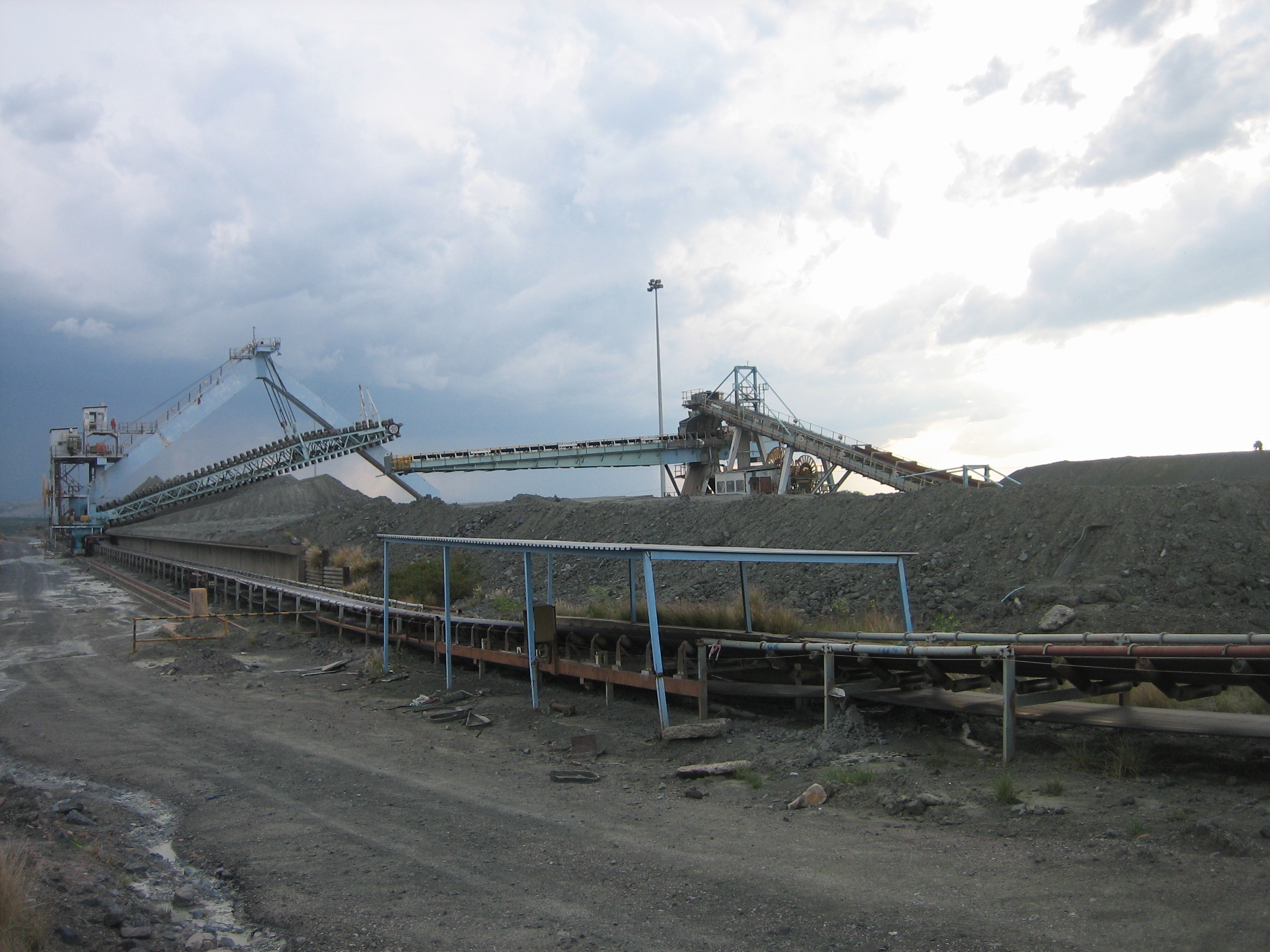 Mine de diamants de Cullinan